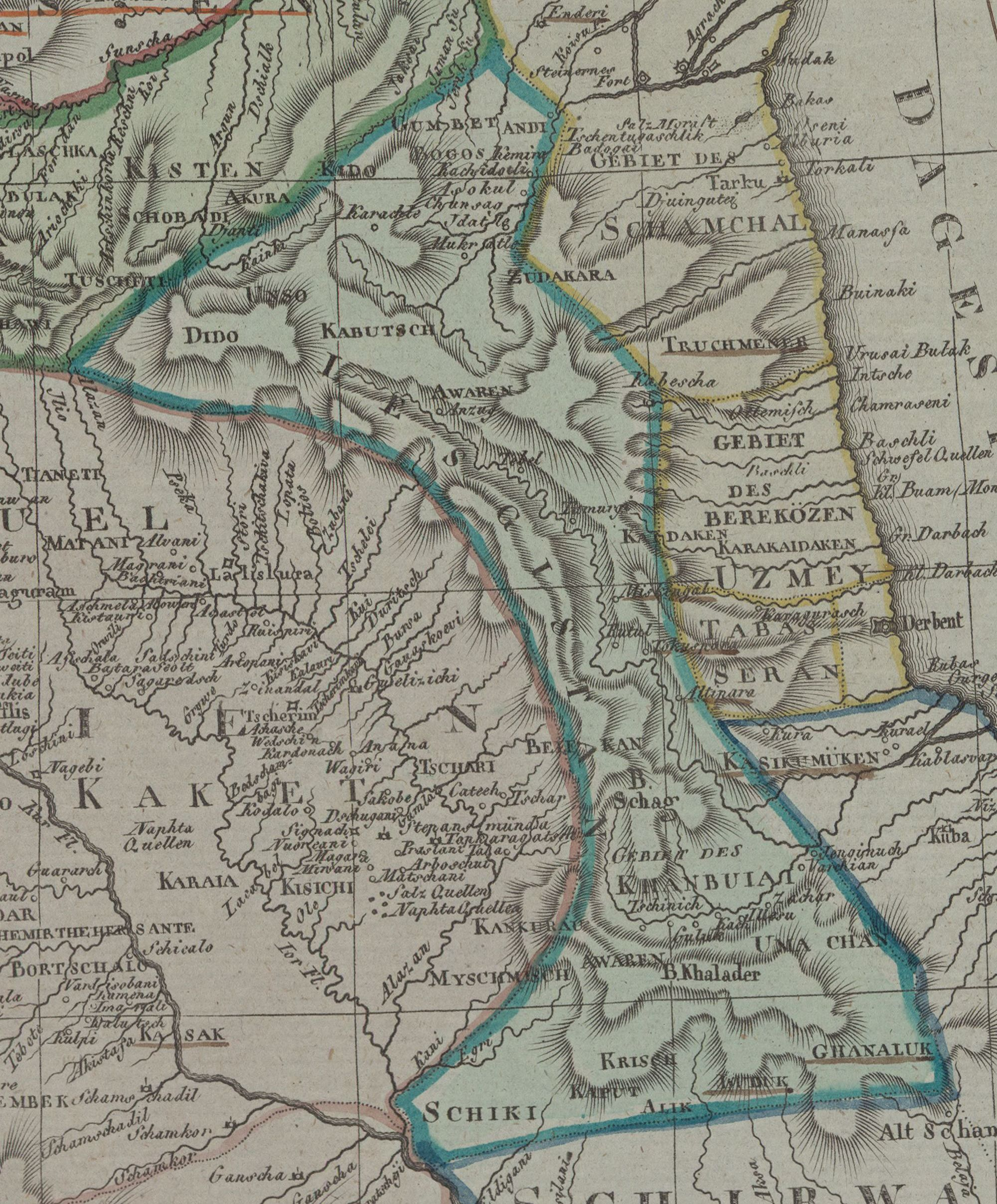 Charte von Laender am Caucasus nach den besten vorhand Charten, Reisen und Astronomischen Ortsbestimmungen / gegeichnet von I.C.M. Reinecke